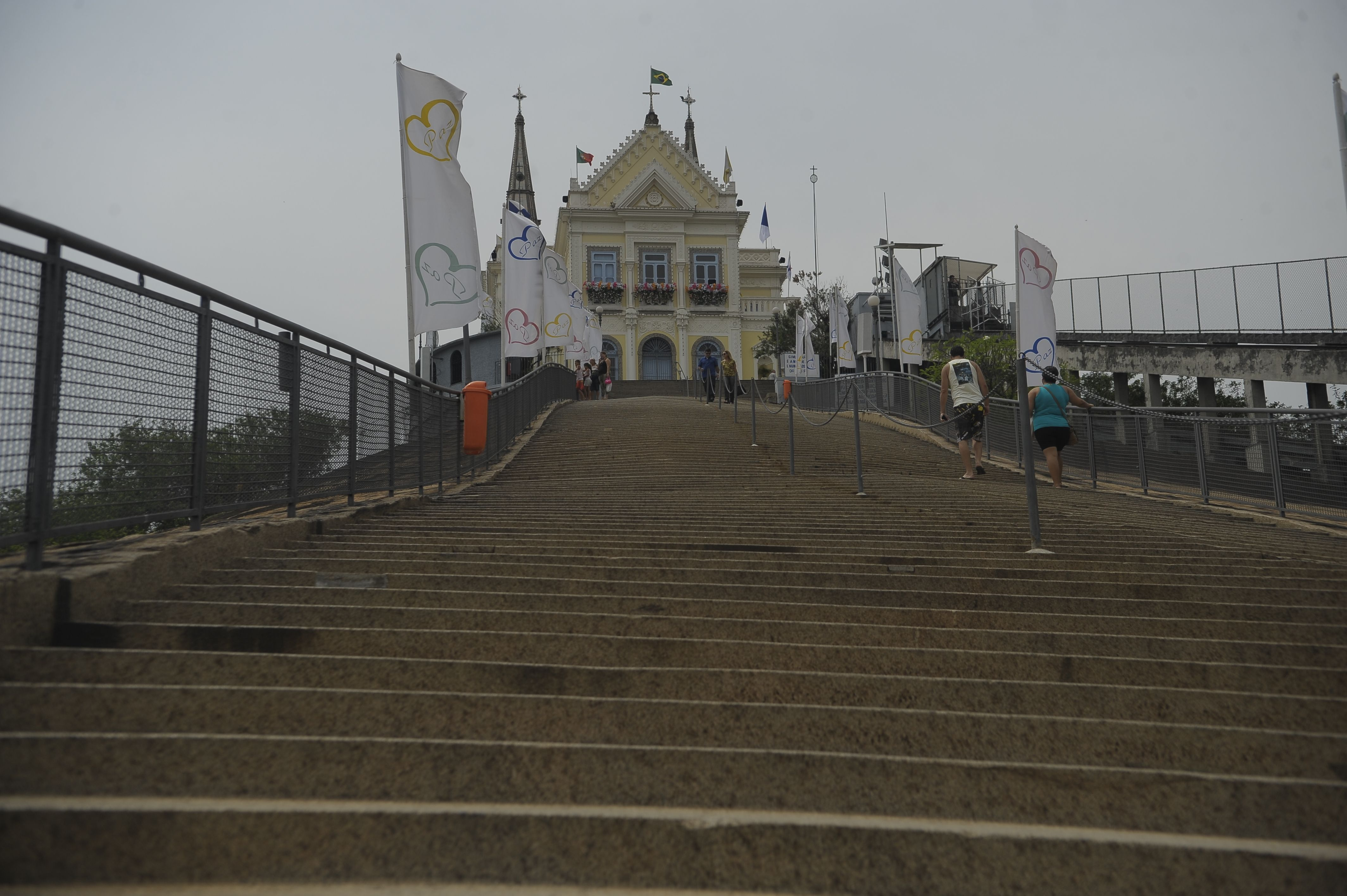 Santuário da Penha, na zona norte, por ocasião de seus 380 anos.